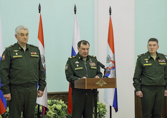 Генерал-полковник Владимир Зарудницкий, заместитель Министра обороны России генерал армии Дмитрий Булгаков и командующий войсками Центрального военного округа генерал-лейтенант Александр Лапин